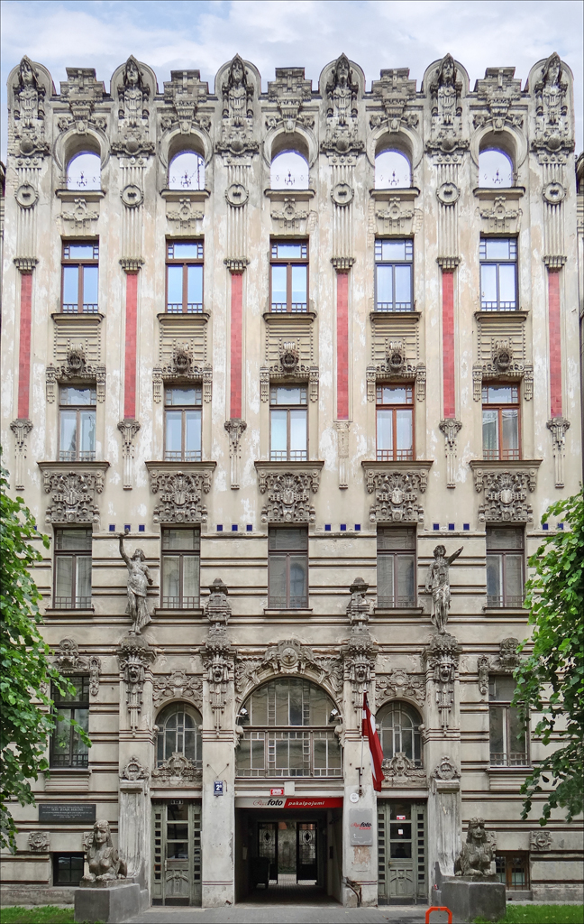 Vue d'ensemble de l'immeuble art nouveau au n° 2a de la rue Alberta (Alberta Iela) à Riga Cet Immeuble art nouveau (jugendstil) a été conçu en 1906 par l'architecte Mikhail Eisenstein (1867—1921). L'immeuble n'a pas encore été rénové comme la plupart des immeubles de la rue Alberta, il se trouve dans un état de délabrement important. Une des caractéristiques de ce bâtiment est la partie supérieure de la façade qui est seulement décorative. Les deux sphinx qui ornent l'entrée ont marqué Serguei Eisenstein (1898-1948), le cinéaste fils de l'architecte, car ils figurent sous une forme de lions ailés sur les fameux escaliers d'Odessa dans son film "Le cuirassé Potemkine". Le site du musée d'art nouveau de Riga sur cet immeuble ___________ Riga, capitale de la Lettonie, est un parfait exemple de ville Art Nouveau. Son centre abrite la plus belle concentration de bâtiments Art nouveau au monde: plus d'un tiers d'entre eux appartiennent en effet à ce style. Cet ensemble architectural est inscrit sur la liste du Patrimoine mondial.... Extrait du site du réseau des villes art nouveau